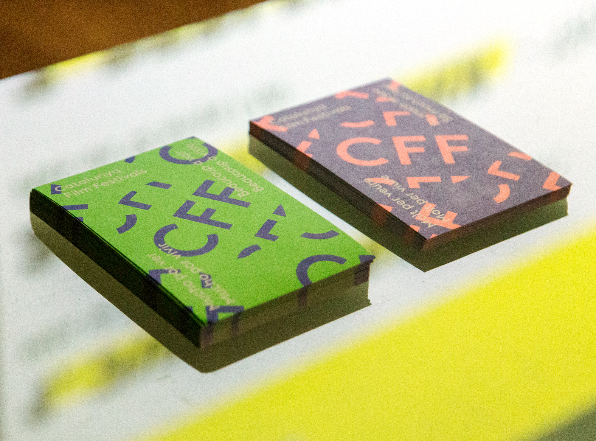 Cartells de Catalunya Film Festivals